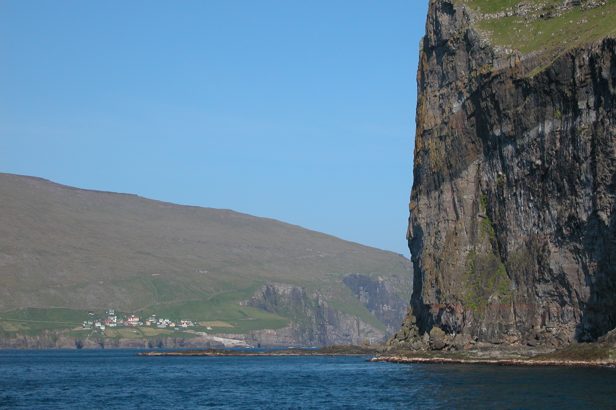 Kirkja på Fugloy med Svínoys nordspids i foregrunden. Færøerne